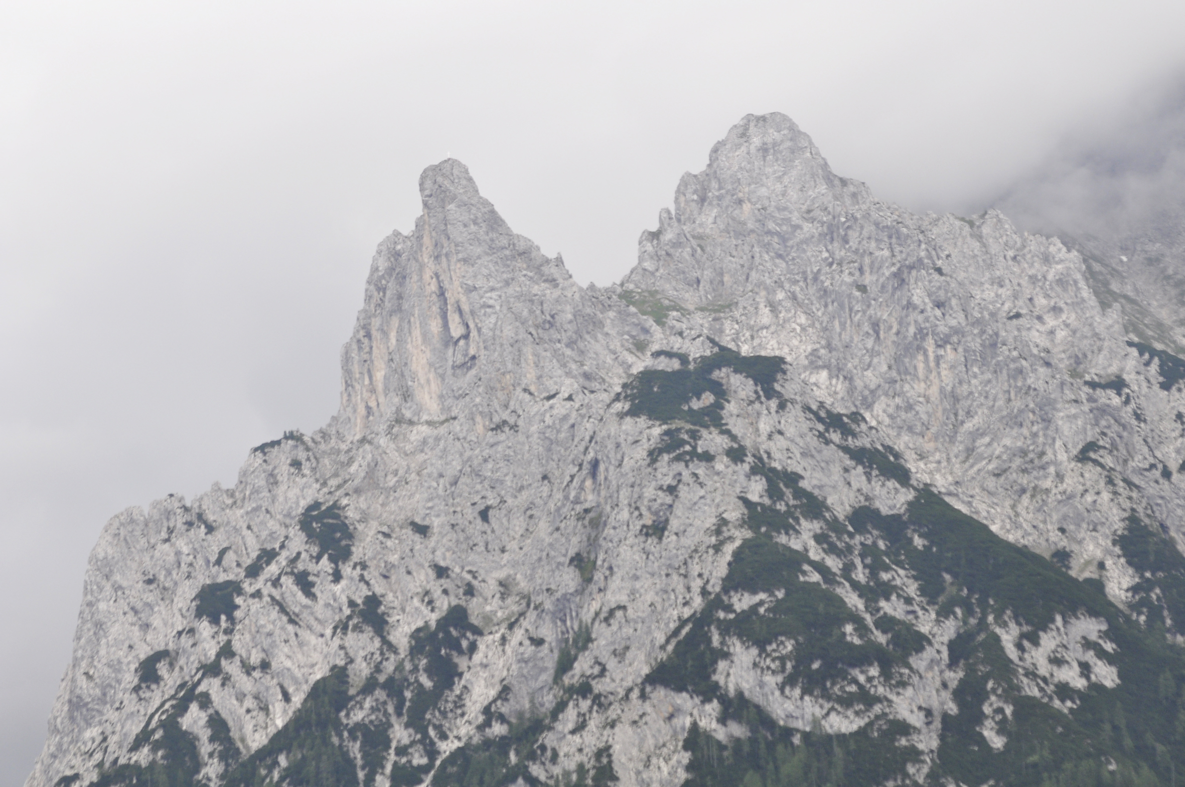 Viererspitze (2054 m) und Nördlicher Karwendelkopf (2358 m) von Mittenwald aus gesehen.